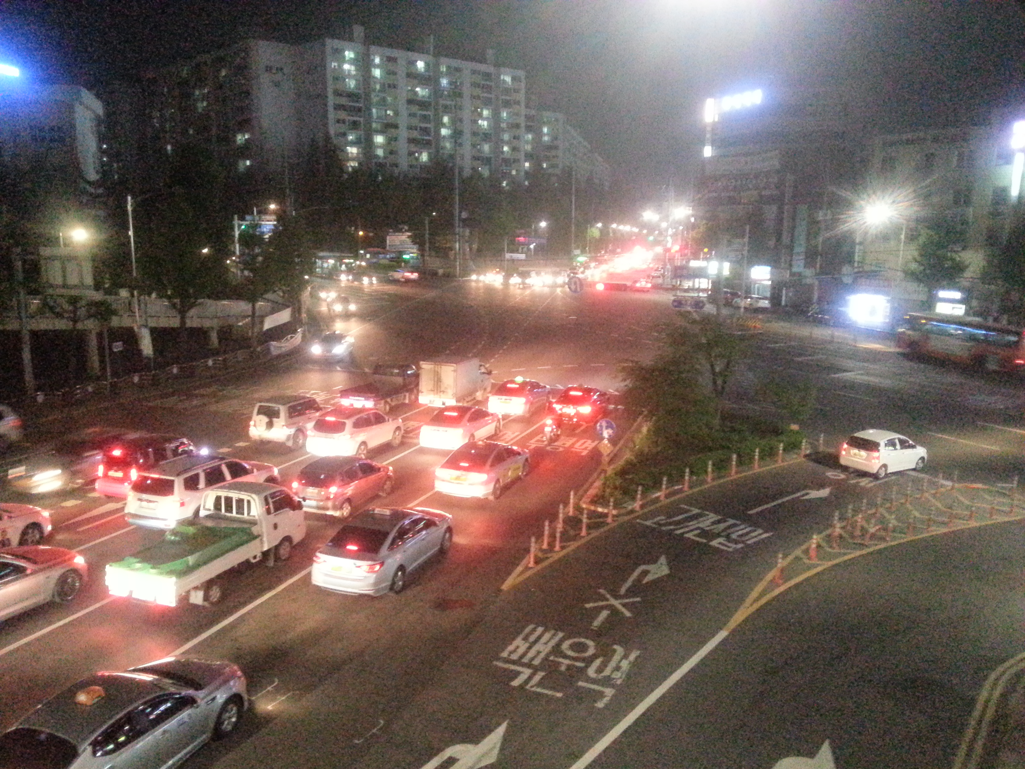 신촌사거리. 인천광역시 부평구 산곡동. (참조 : ↕경원대로, ↔마장로)